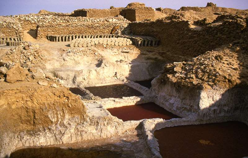 Saline Kalala nahe Bilma/Niger mit Viehsalz-Kantus und Solebecken.